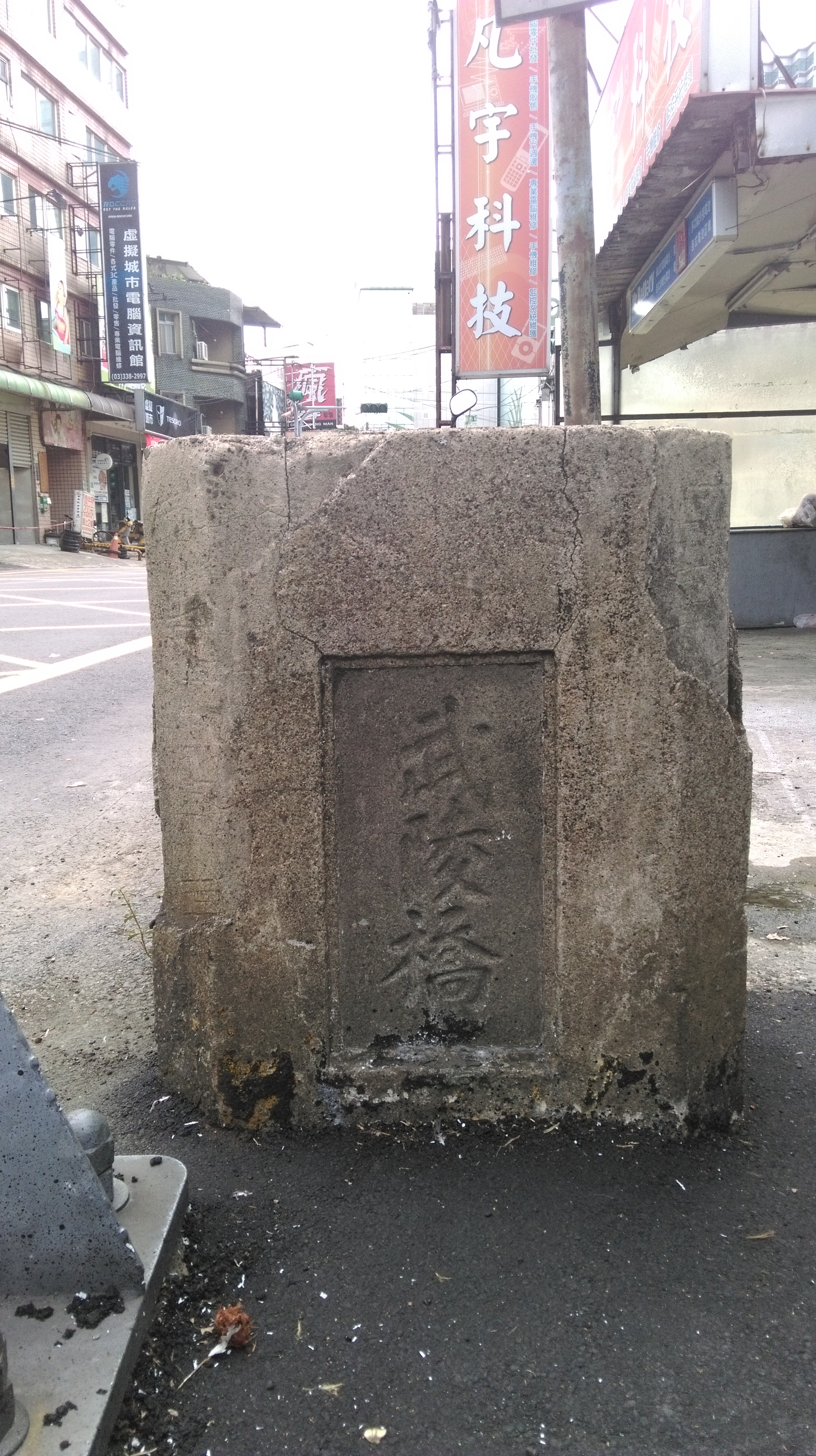 位於桃園市中心，桃園火車站附近。